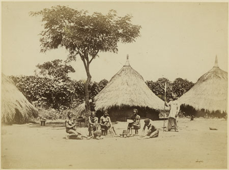 Azandžių vienkiemis XIX a.